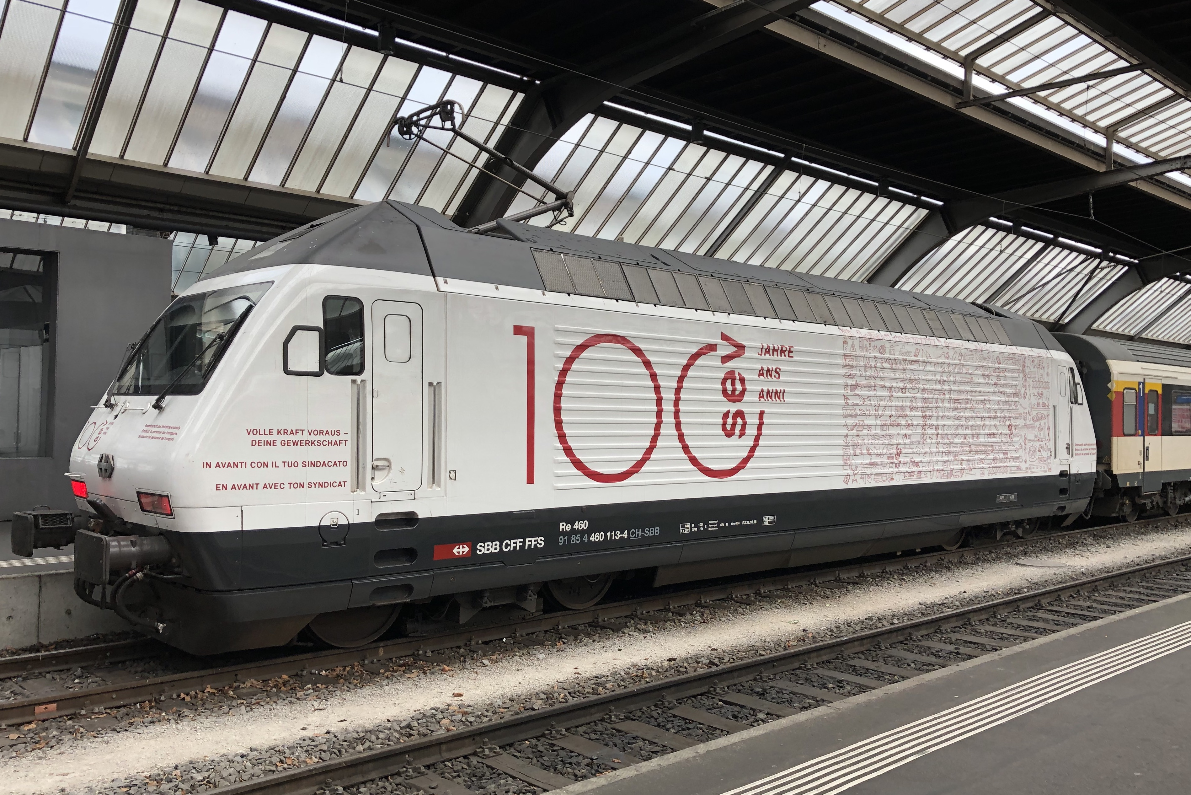 SBB Re 460 als Werbeträger für die Gewerkschaft des Verkehrspersonals in der Schweiz im HB Zürich